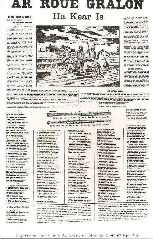 Gwerz Ar Roue Gralon ha Ker Is (Le Roi Gradlon et la Ville d'Ys) sur feuille volante, Impr. Haslé (Morlaix), 1850.